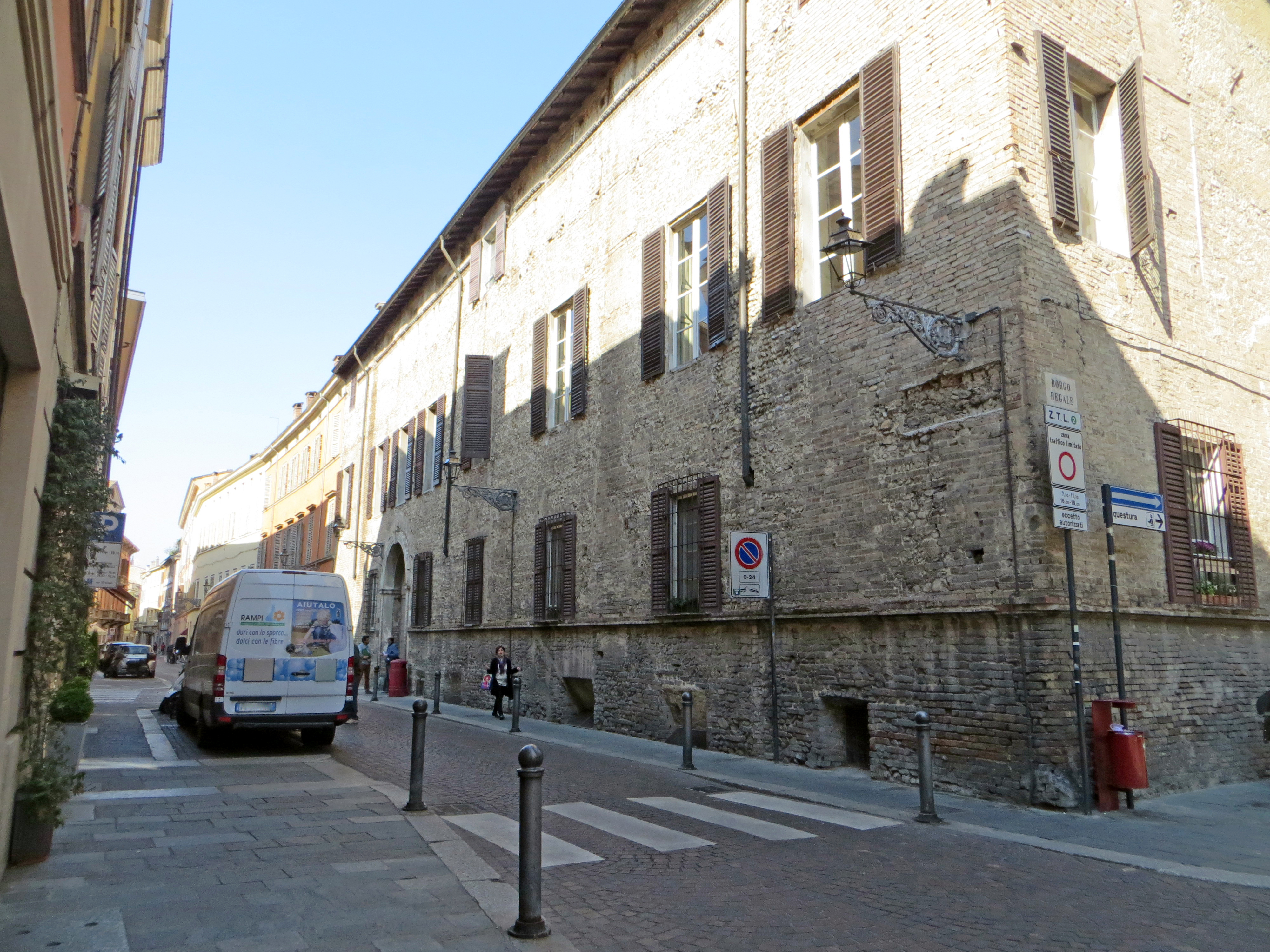 Palazzo Boselli - facciata